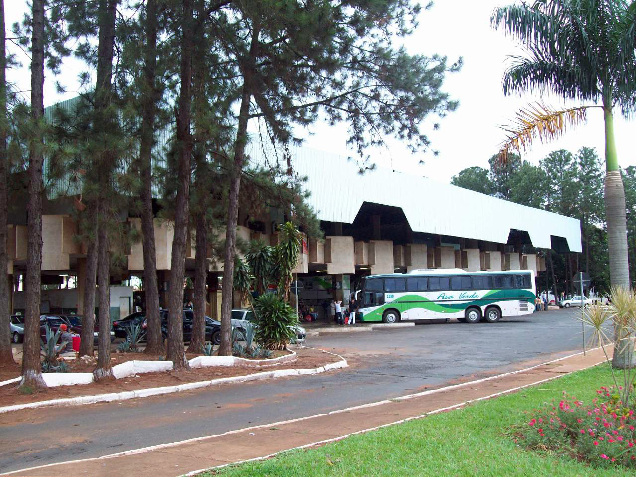 Rodoviária de Rio Verde Goías, Brasil.